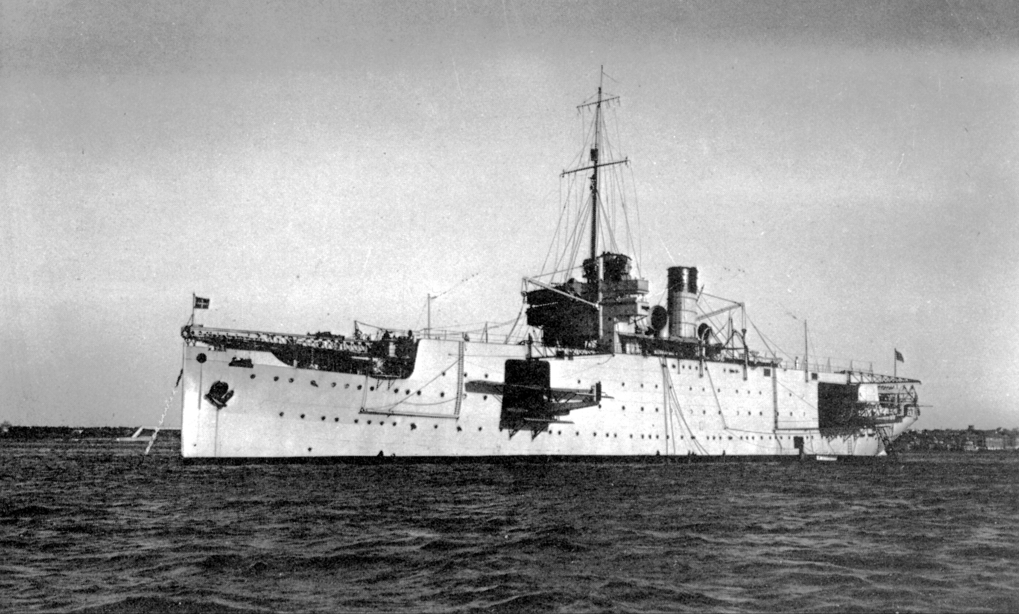 La nave appoggio idrovolanti Miraglia nel 1932